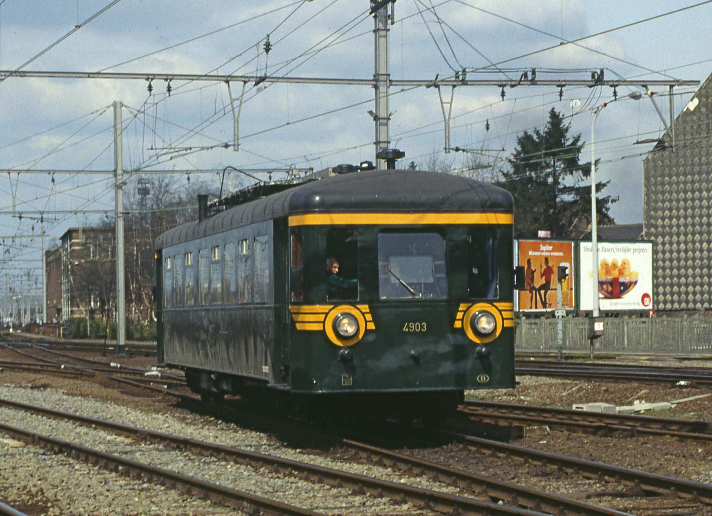 De 4903 railcar in Leuven (noordkant). Die werd nog gebruikt als werktrein.